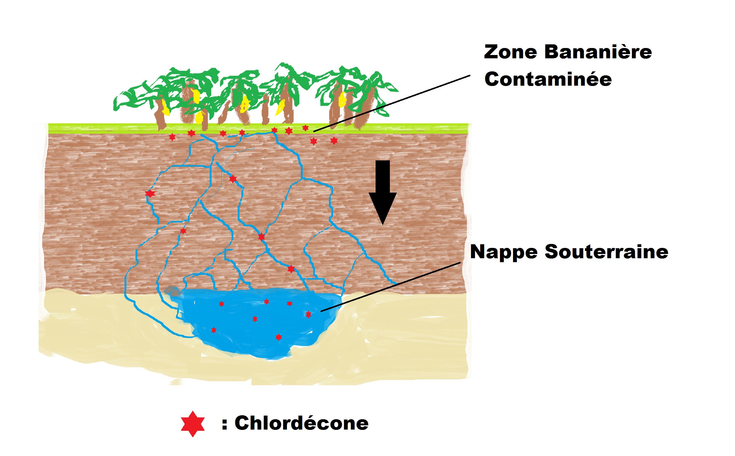 Ce schéma reprend le méconisme de contamination des nappes phréatiques par la chlordécone. (Et les pesticides en général). Attention ! Il ne décrit pas le passage des nappes phréatiques vers les rivières